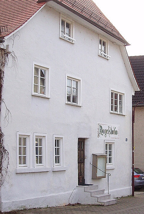 Mittelstraße in Heilbronn-Neckargartach